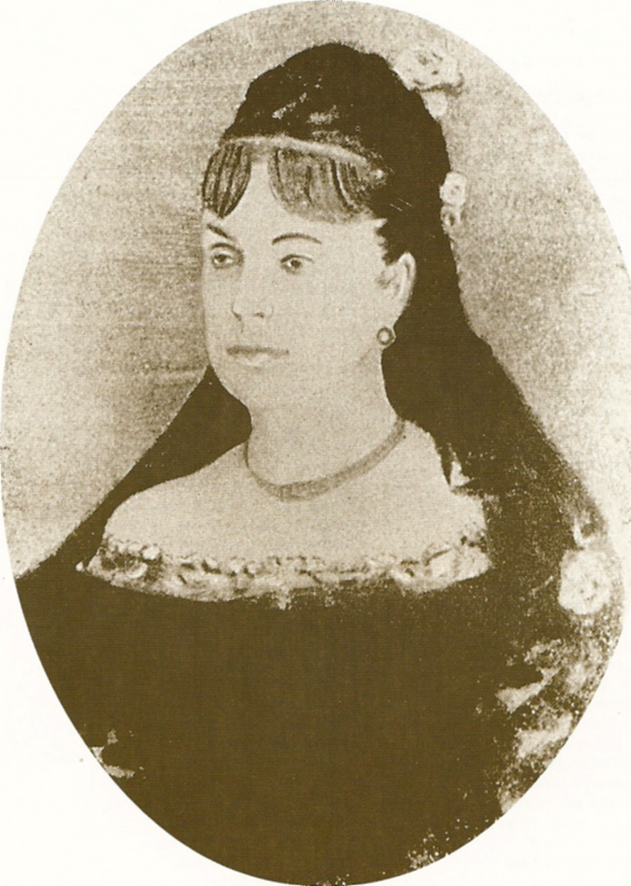 Eugênia Infante da Câmara (Lisboa, 09/04/1837 - Rio de Janeiro, 28/05/1874), atriz e escritora portuguesa.